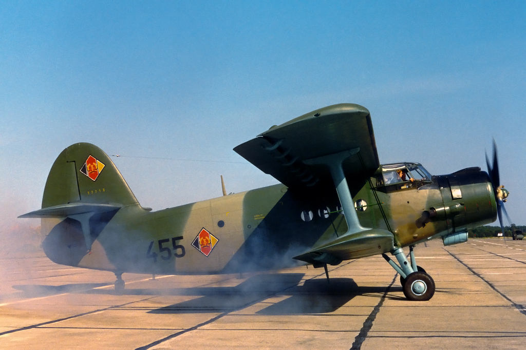 An-2 "Anna" starting up at Holzdorf